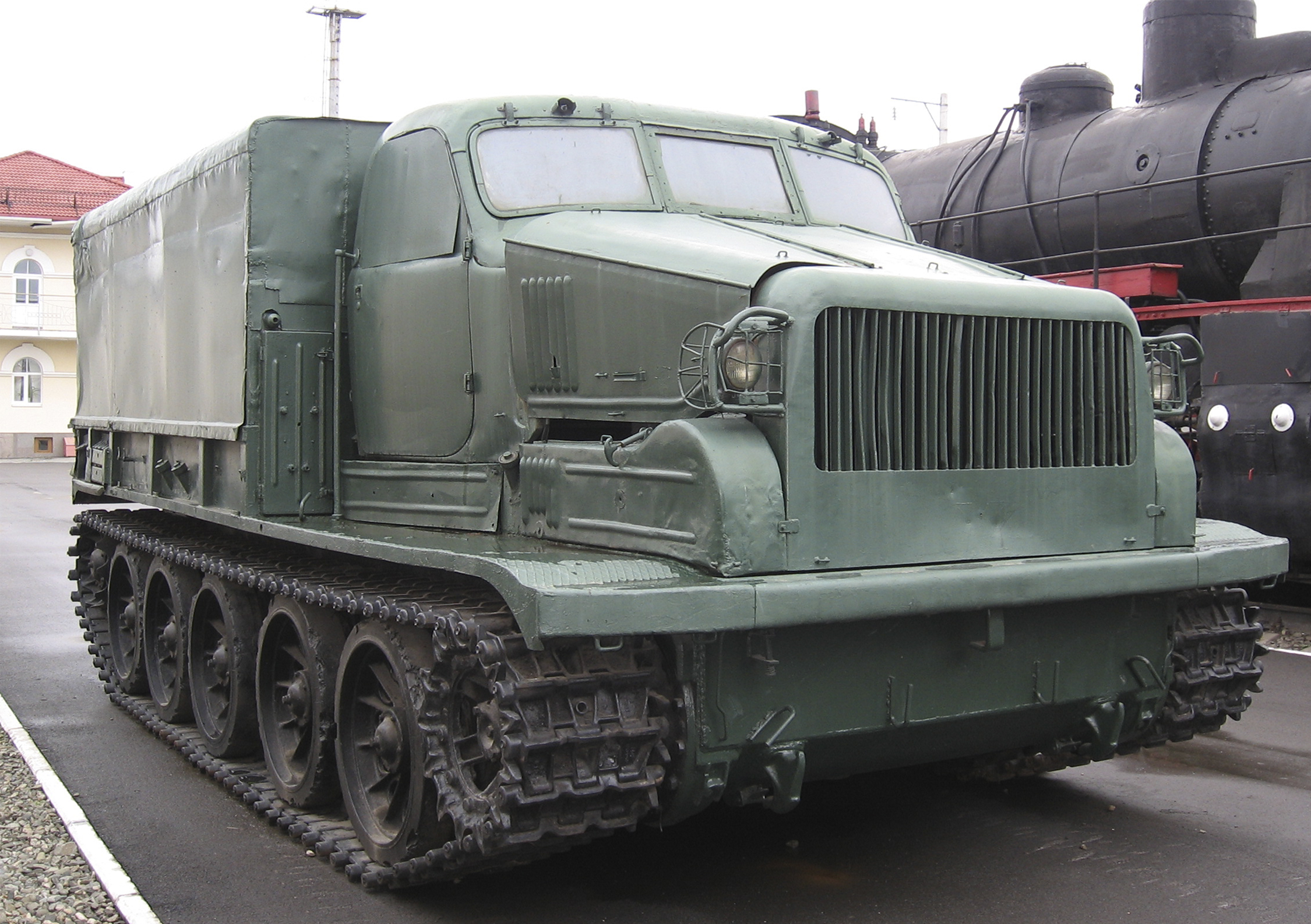 Построен в 1943 году